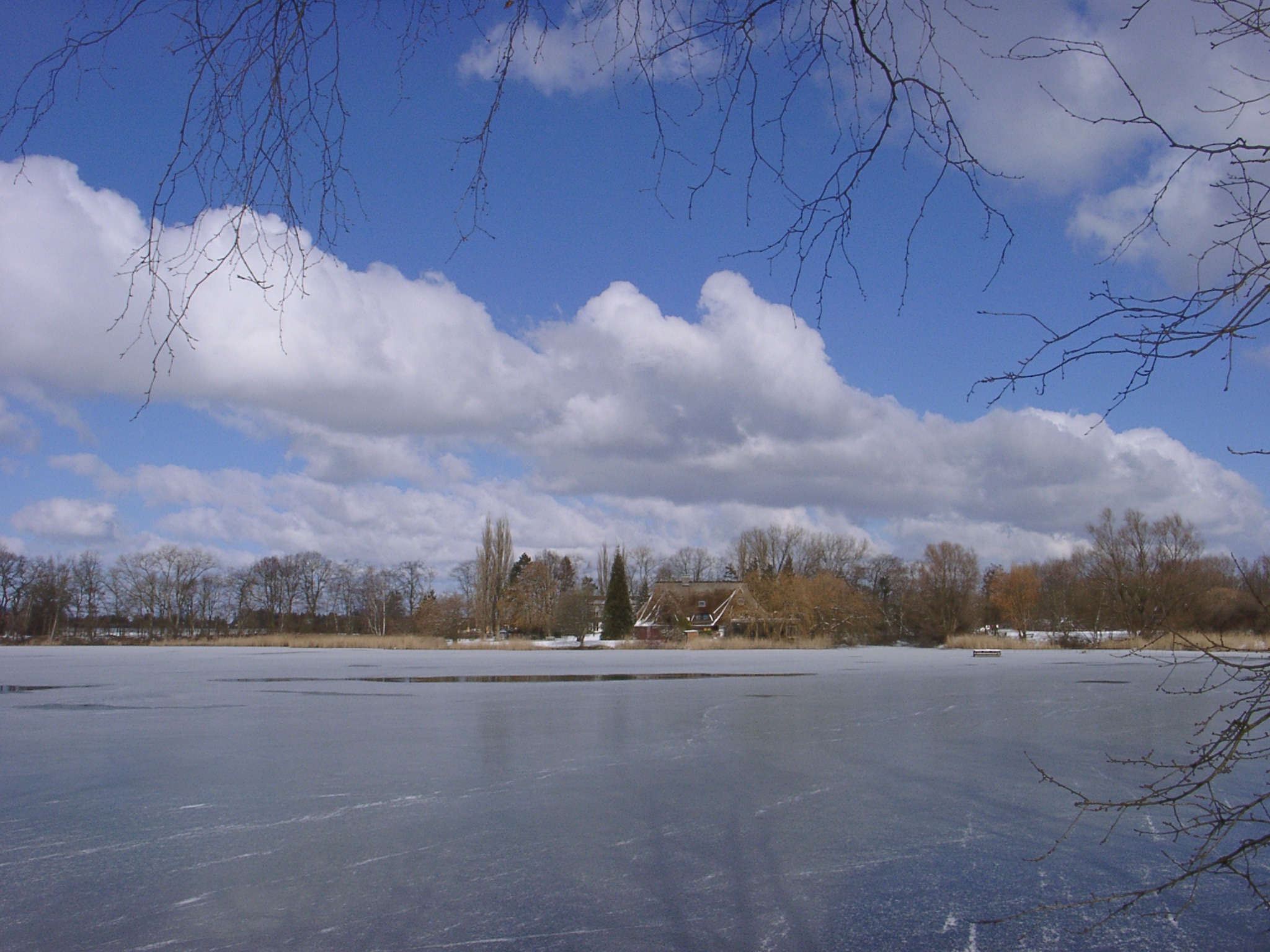 Garbsen, Berenbosterler See im Winter. 2005-02-27